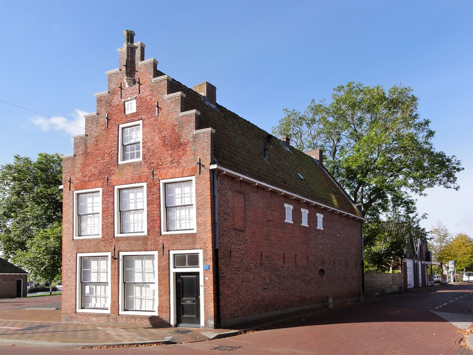 Keppelstraat 40 Dokkum, rijksmonument